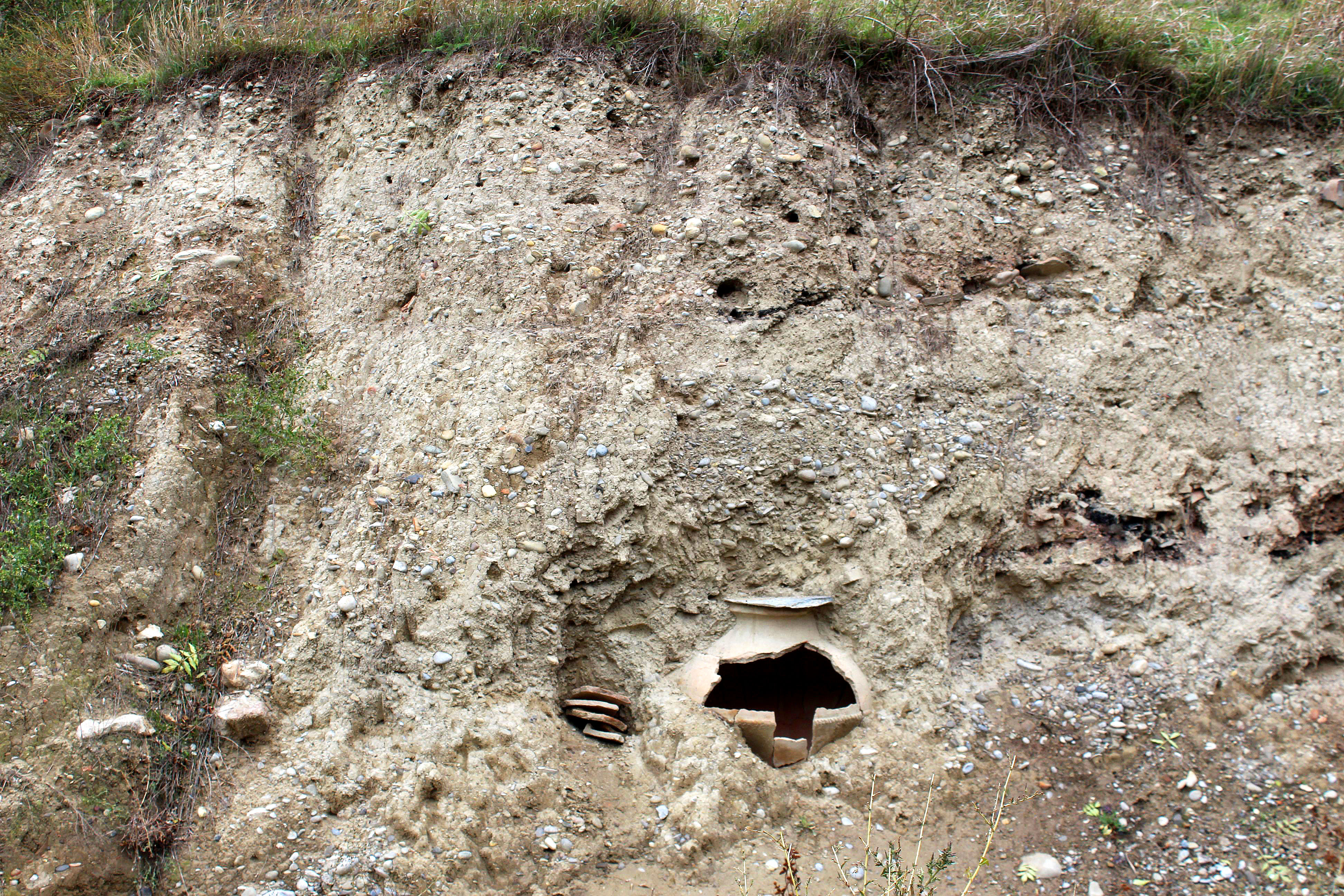 შიოს სასაფლაო-ეკლესია